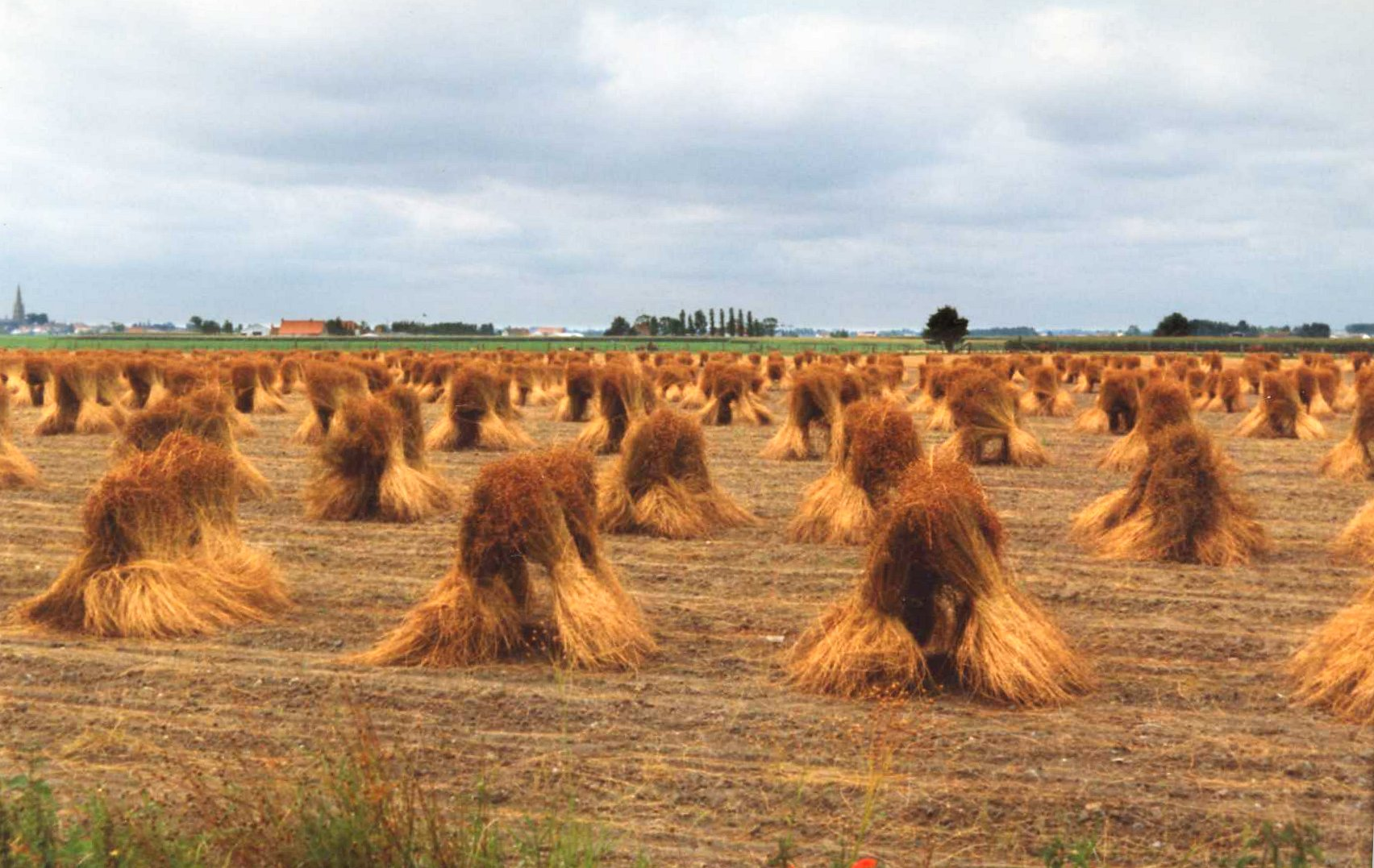 Vlas op rijen geplaatst om te drogen.